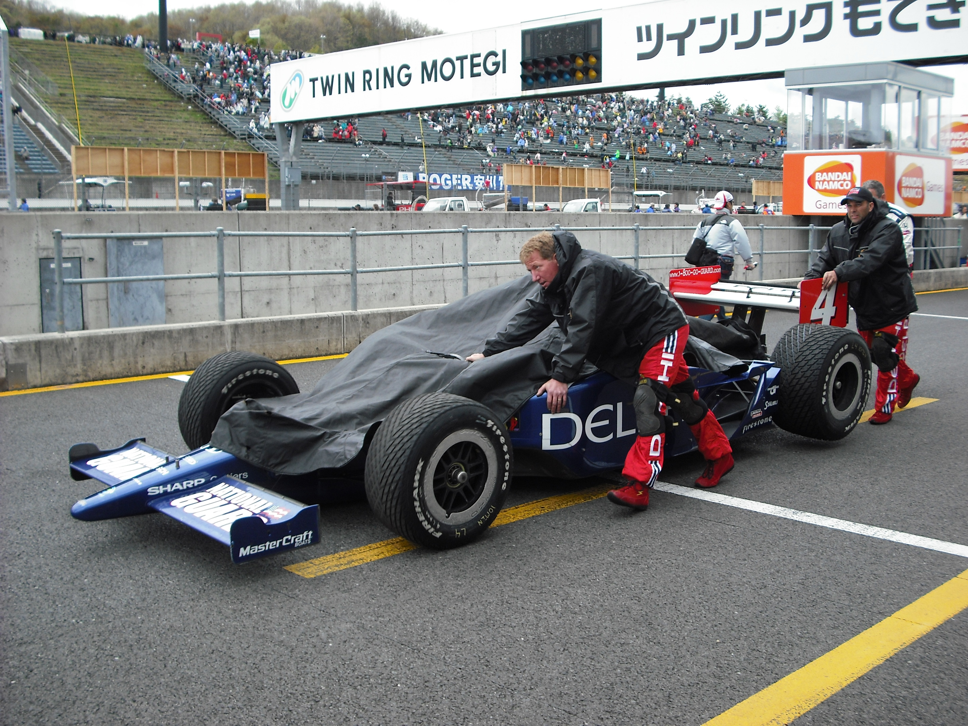 Pit lane at Indycar Motegi 2008